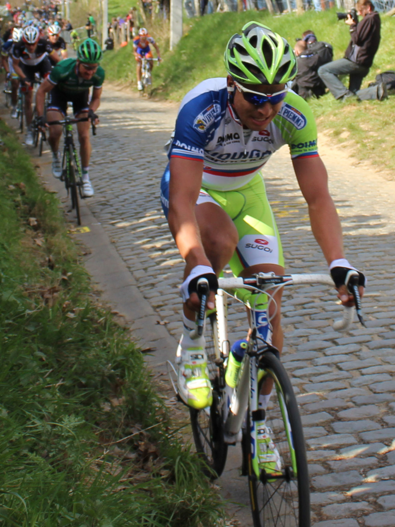 Peter Sagan in the 2012 Ronde van Vlaanderen (Tour of Flanders)